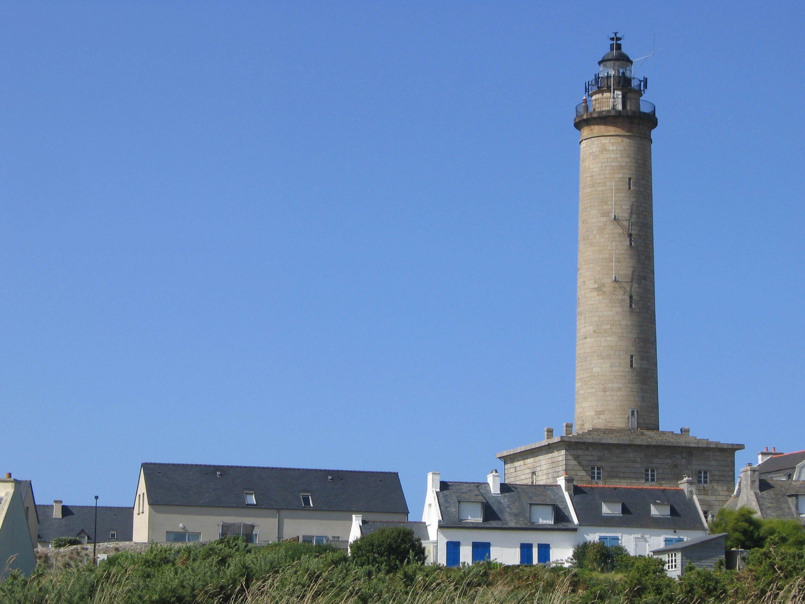 Le phare de l'île de Batz